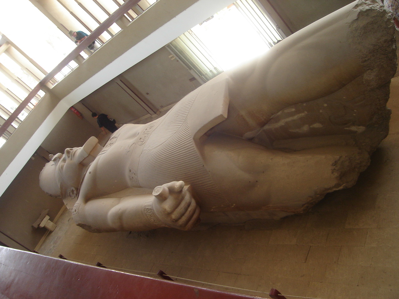 Immagine dall'Egitto - Il Cairo-Menfi